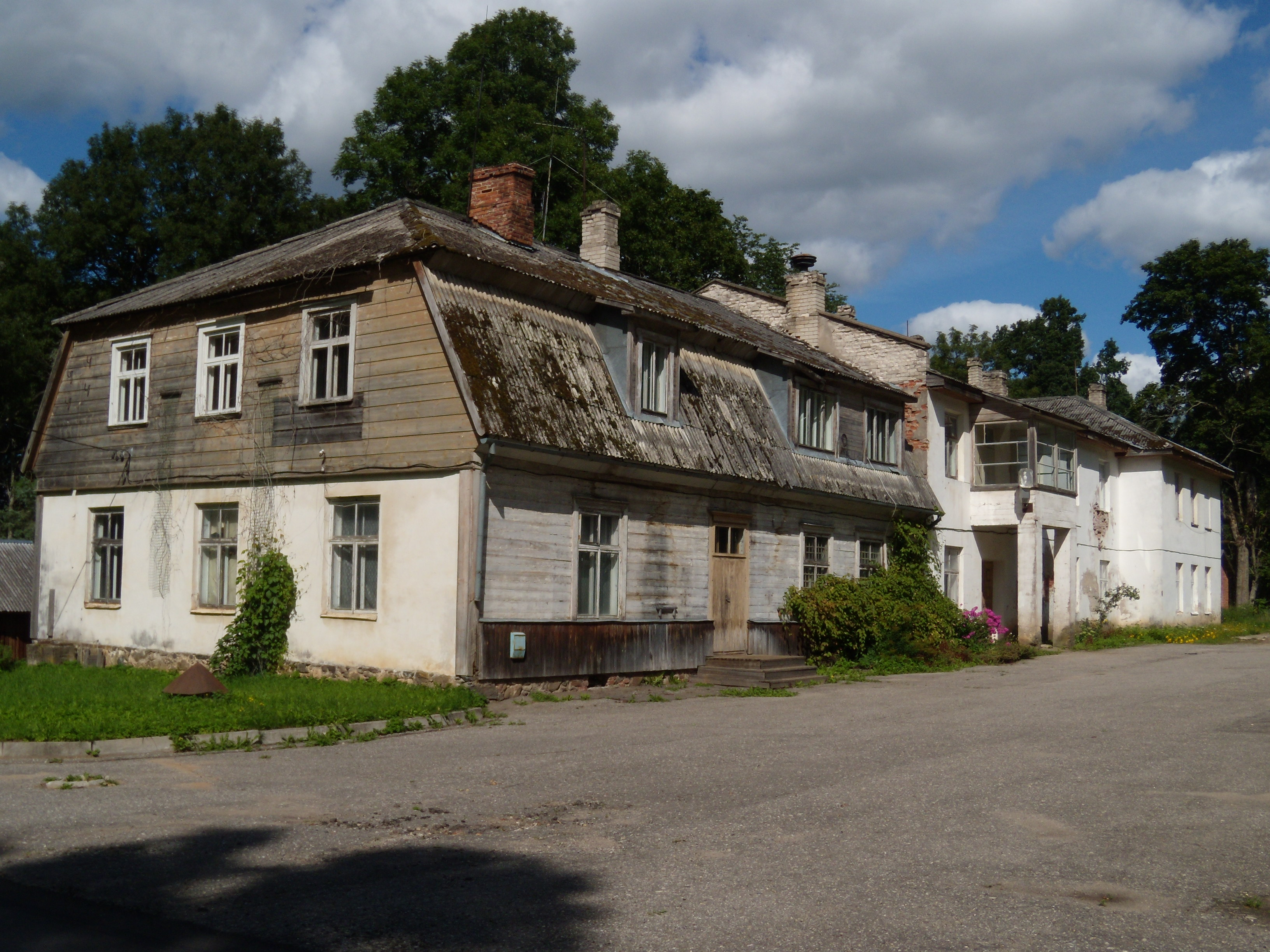 Luke (Lugaži) mõisa peahoone 2009. aastal.